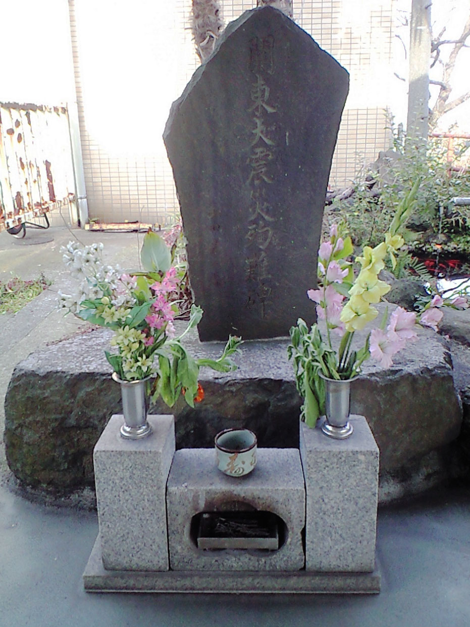 神奈川県小田原市根府川、JR東日本東海道本線根府川駅、関東大震災殉難碑（1973年（昭和48年）9月）